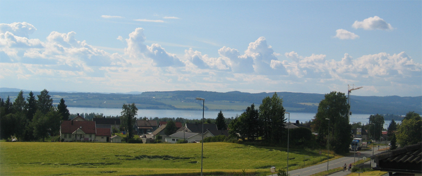 Bilde av Ottestad